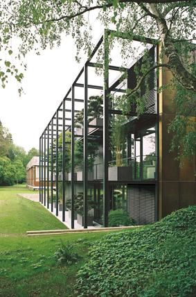 Nordwestfassade des Erweiterungsgebäudes des Bundesverfassungsgerichts in Karlsruhe.